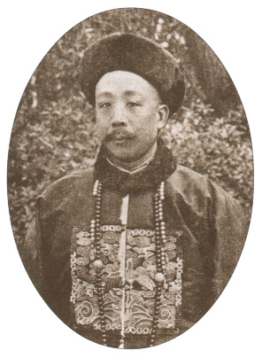 李家驹（1871年－1938年），字昂若，号柳溪，汉军正黄旗人。清末民初政治人物。